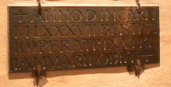 Bertha of Savoy